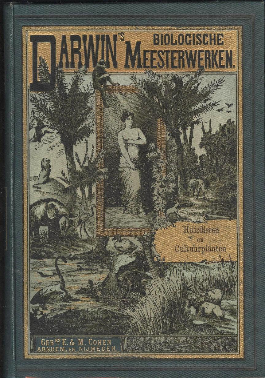 Darwin huisdieren en cultuurplanten